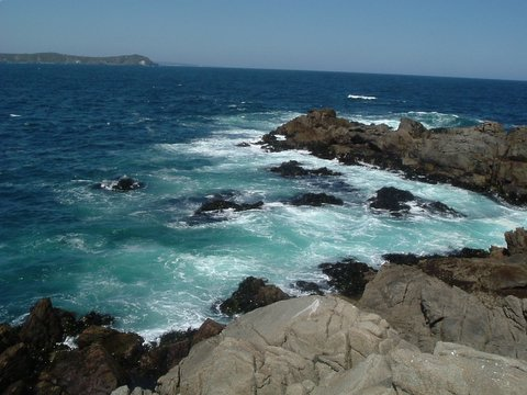 Costa rocosa de Quintay (Chile)